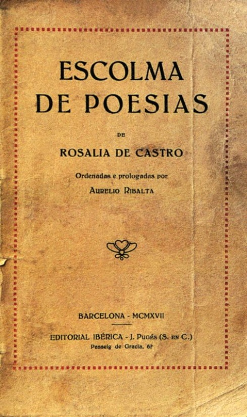 Escolma de poesías de Rosalía de Castro ordenadas e prologadas por Aurelio Ribalta